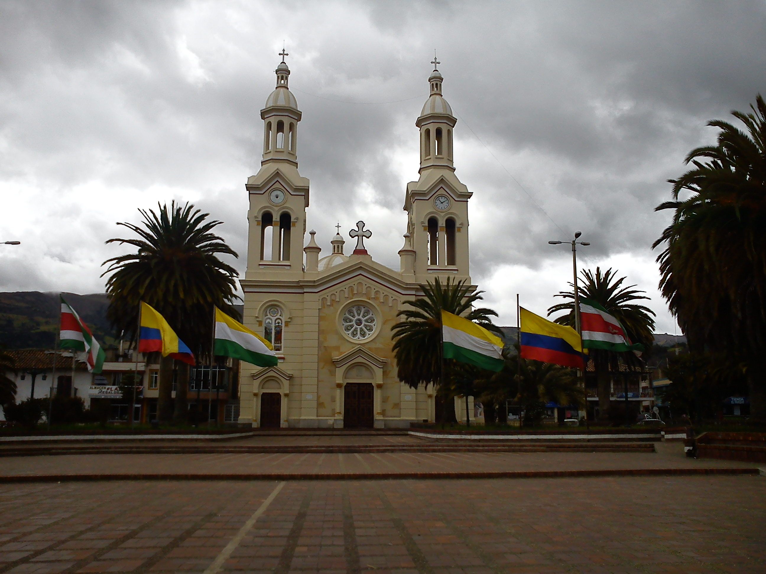 Plaza ppal Belén-Boyacá. A Pulido-Villamarín